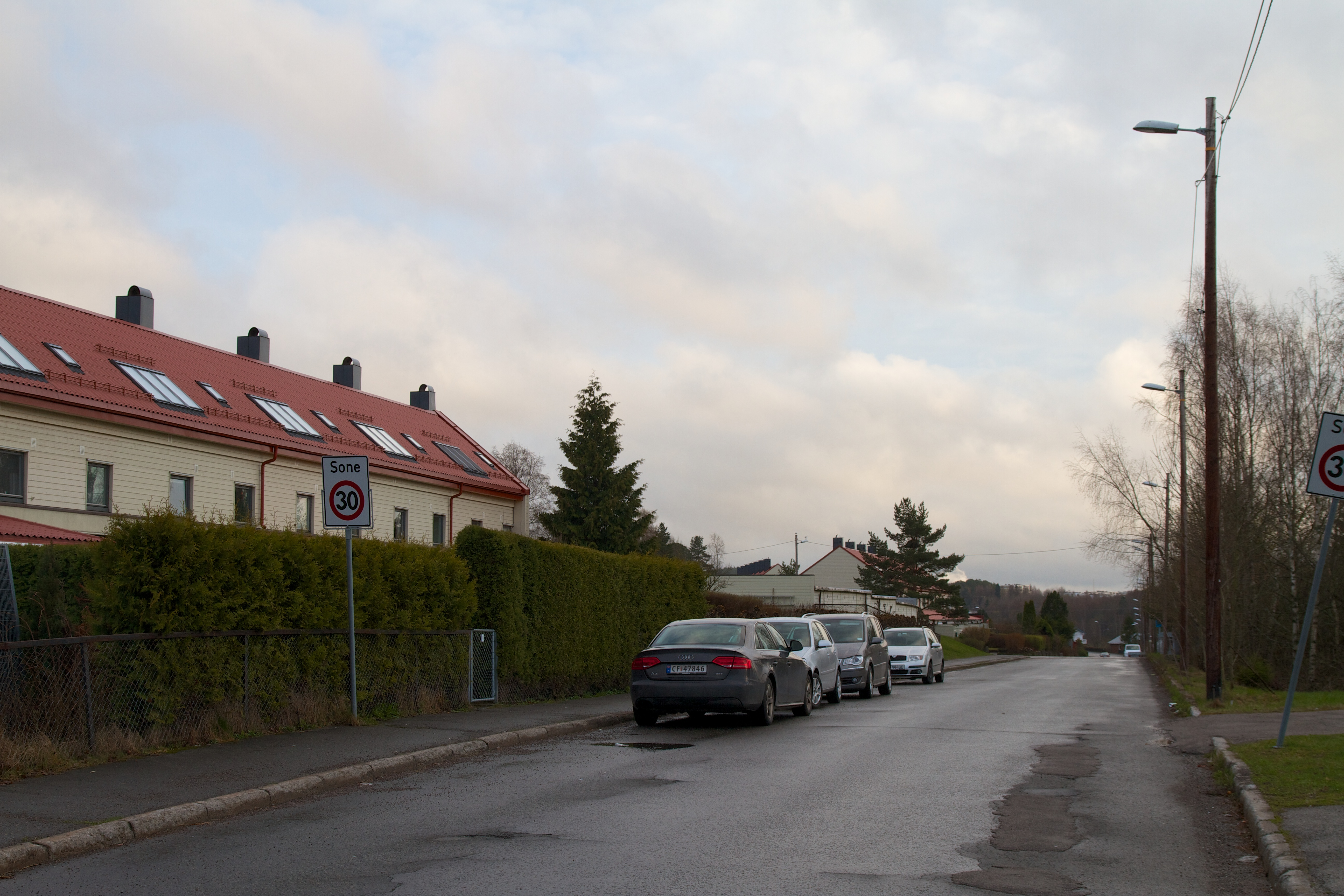 Bogerudveien på Bogerud i Oslo.